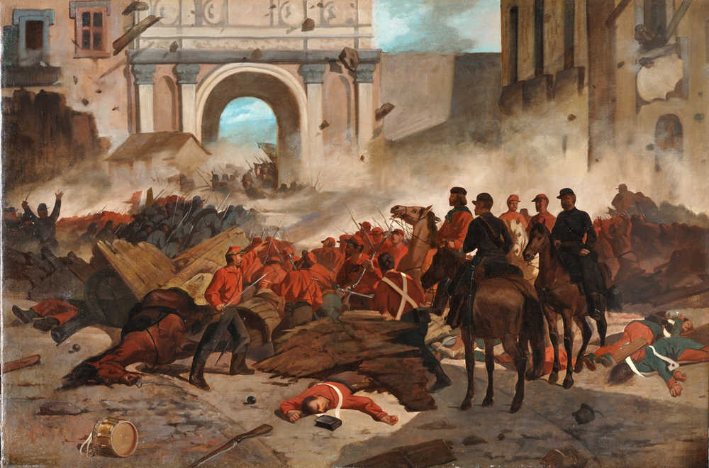 Garibaldi a Palermo. Tela a olio di Giovanni Fattori (1860-1861)